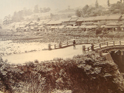 東京小石川遠景 This photographic image was published before December 31st 1956, or photographed before 1946, under jurisdiction of the Government of Japan. Thus this photographic image is considered to be public domain according to article 23 of old copyright law of Japan (English translation) and article 2 of supplemental provision of copyright law of Japan. To uploader: Please provide an image source.